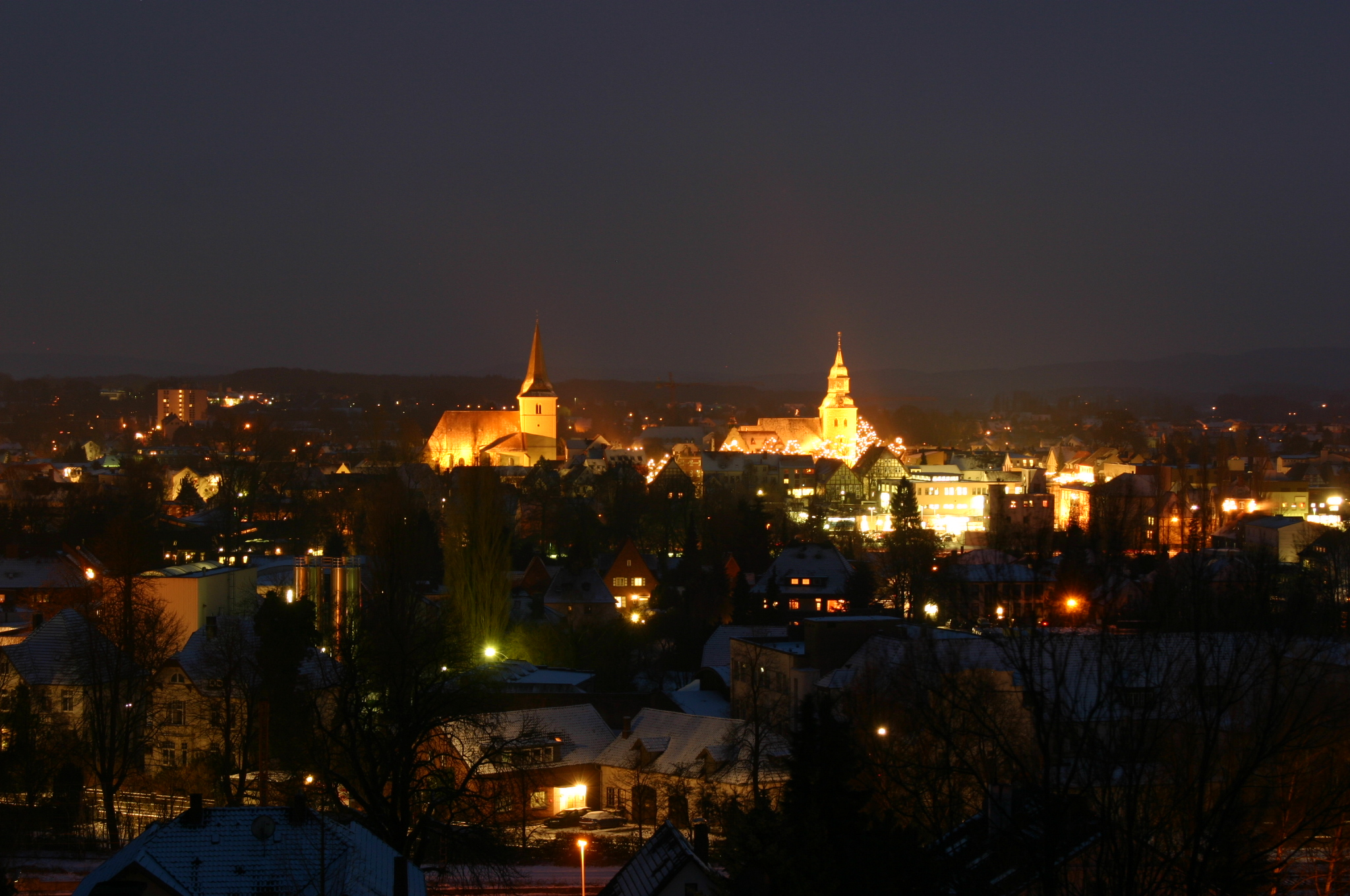 Nachtpanorame der Stadt Melle; Blick von den Meller Bergen auf die Innenstadt